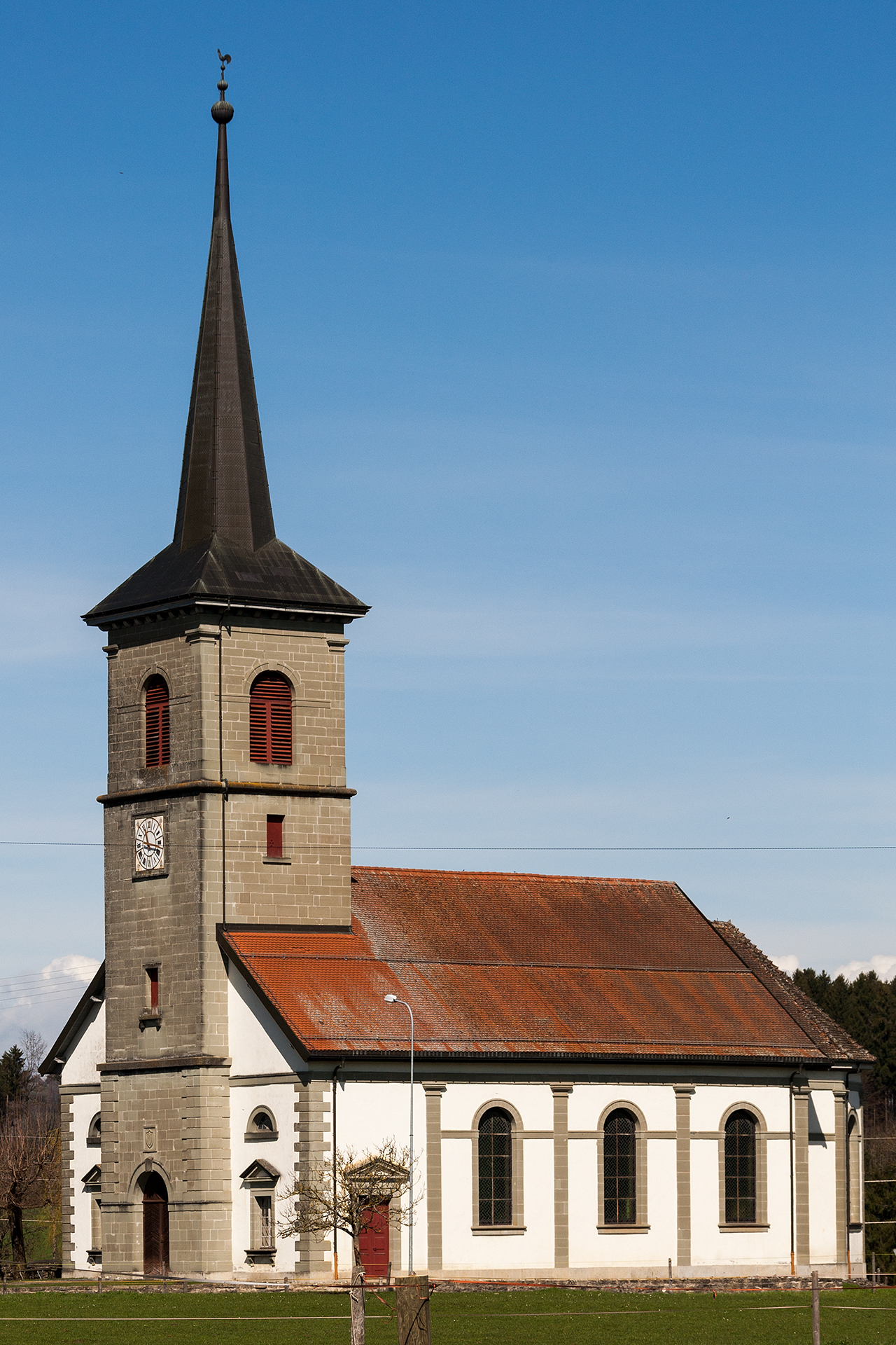 Kirche (Eglise) in Palézieux (VD)